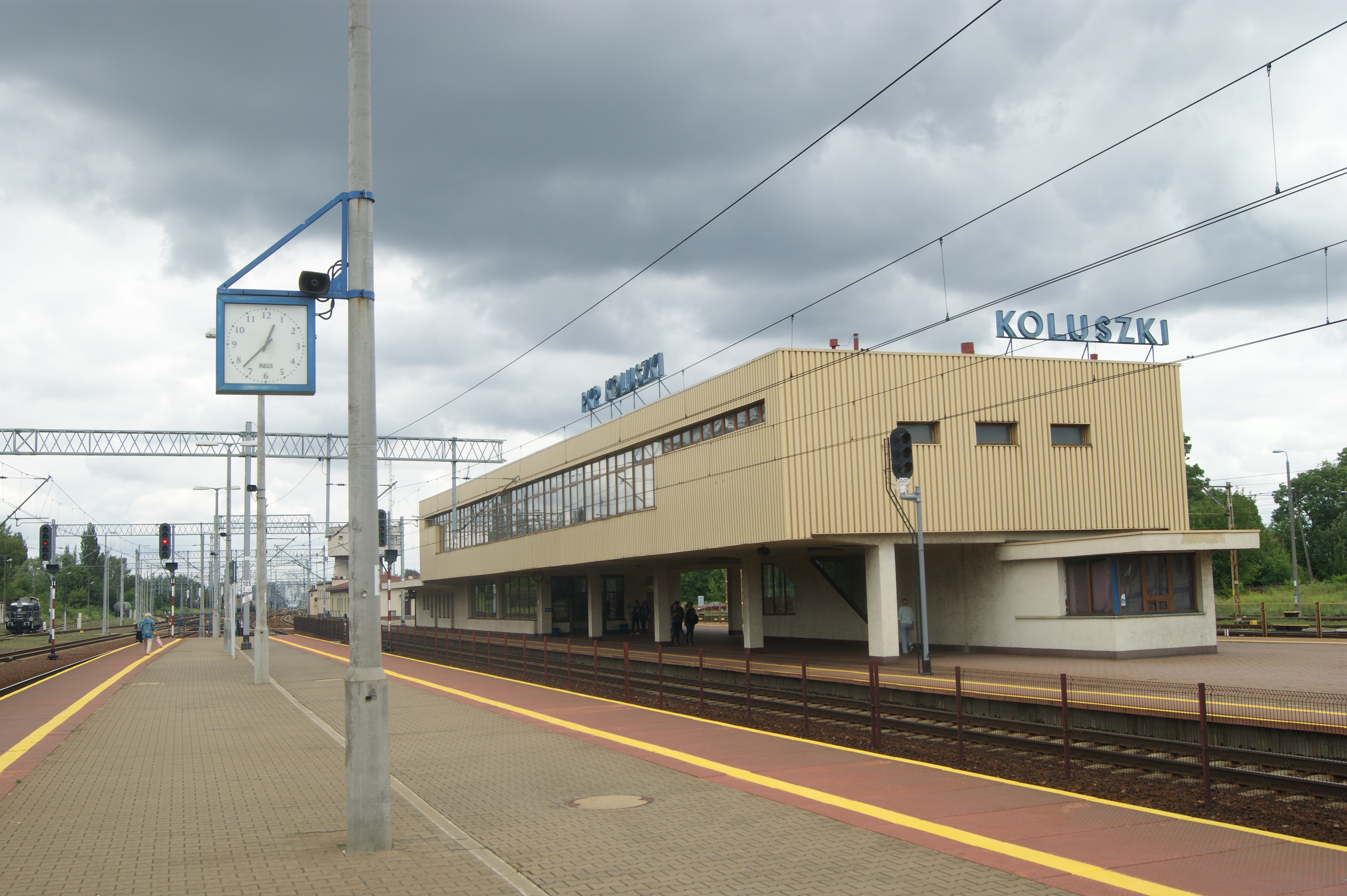 Koluszki - Budynek dworca